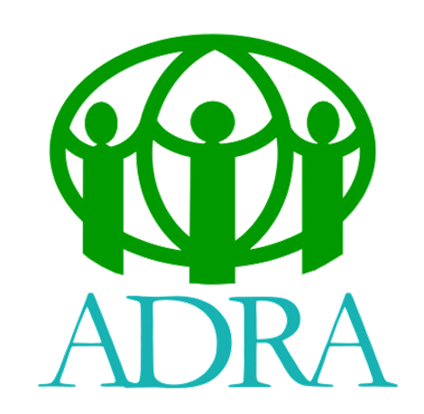 Logo da Agencia Adventista de Desenvolvimento e Recursos Assistenciais